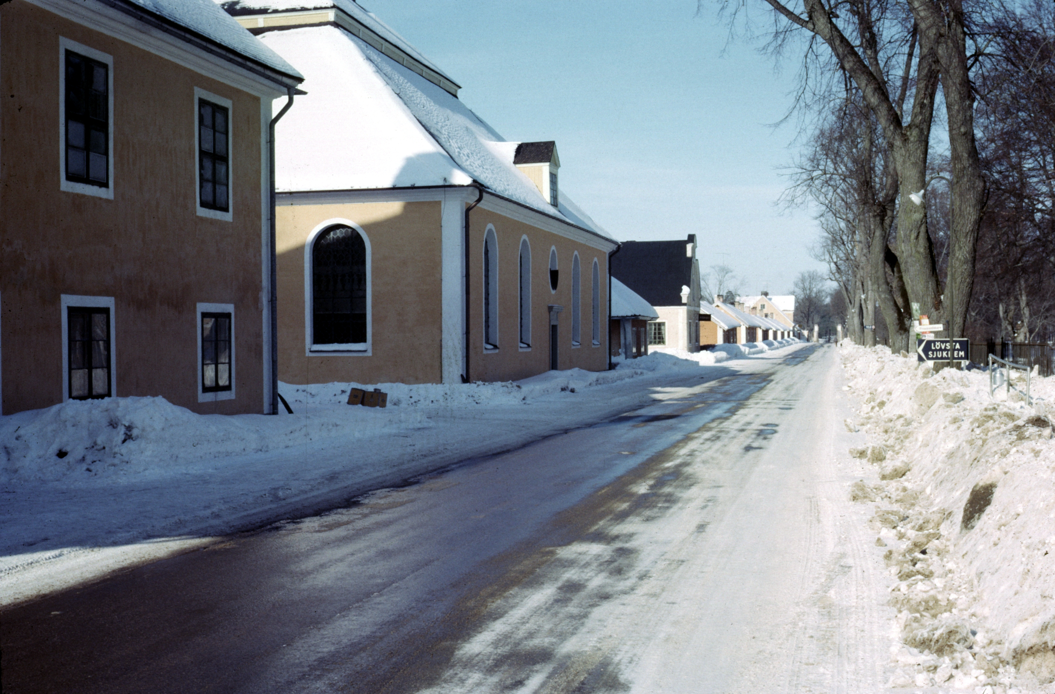 Lövsta bruk, Sweden